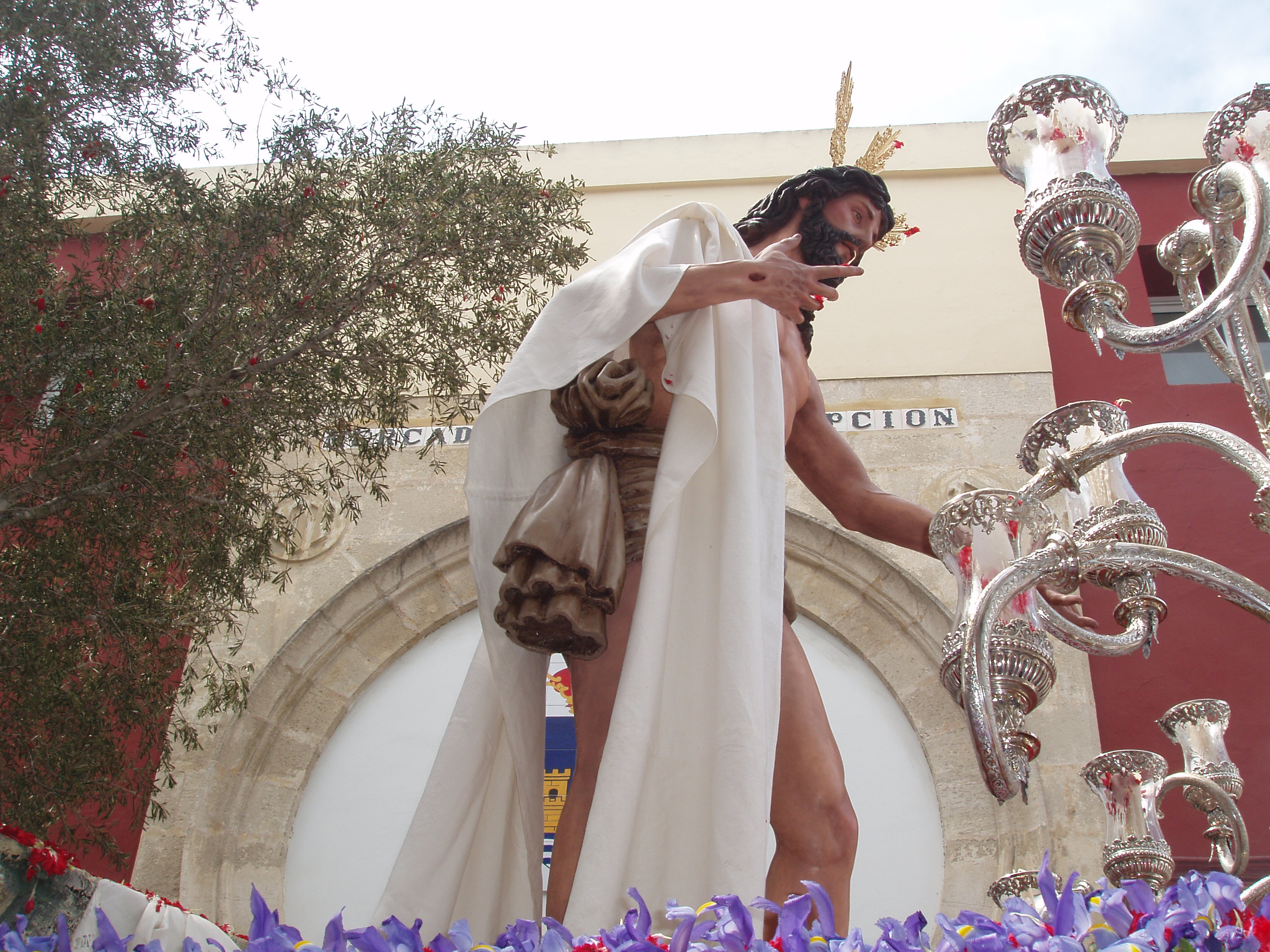 El Resucitado. Domingo de Resurrección. Semana Santa en El Puerto de Santa María. Año 2006.